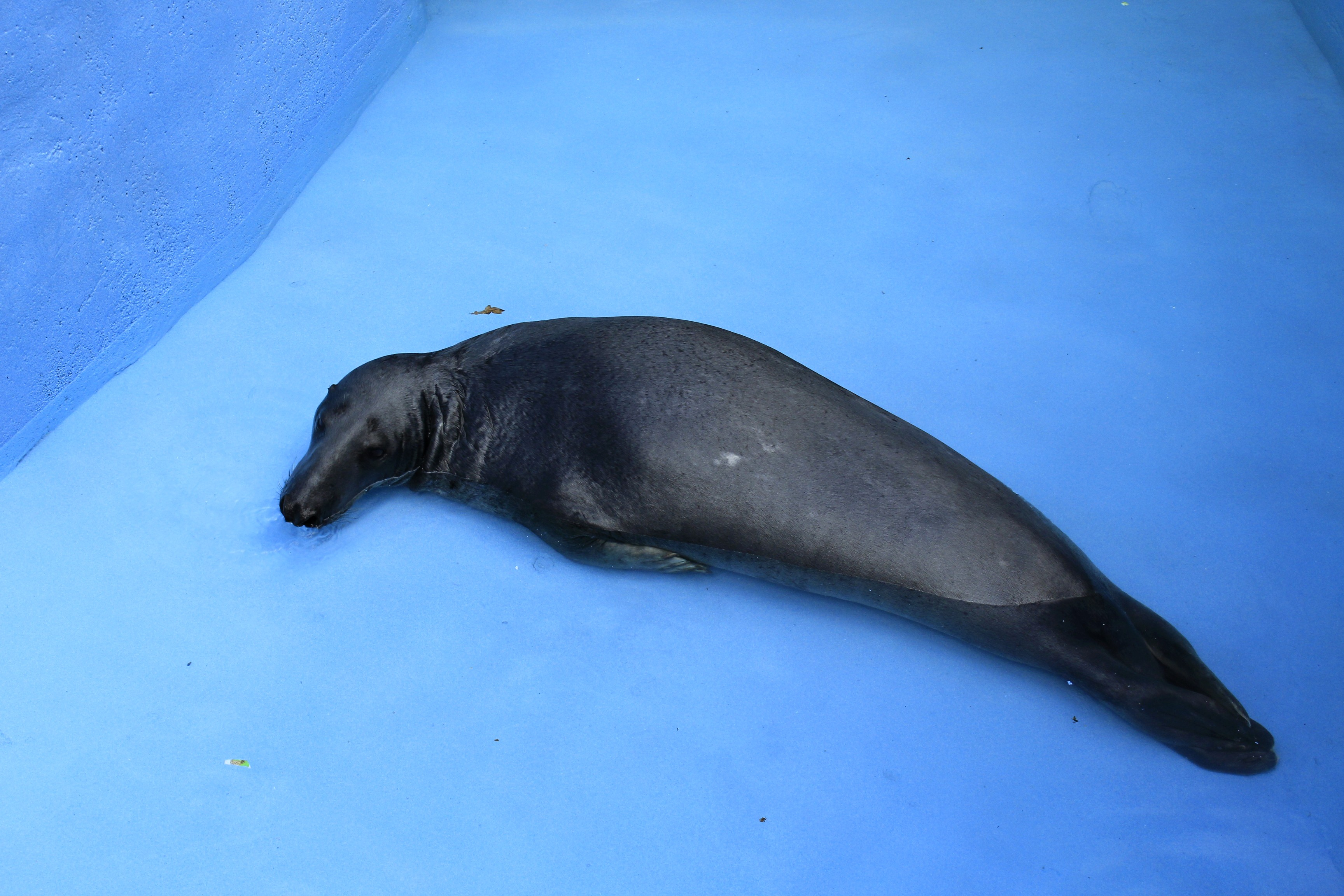 Ilgasnukis ruonis Kajus Lietuvos zoologijos sode